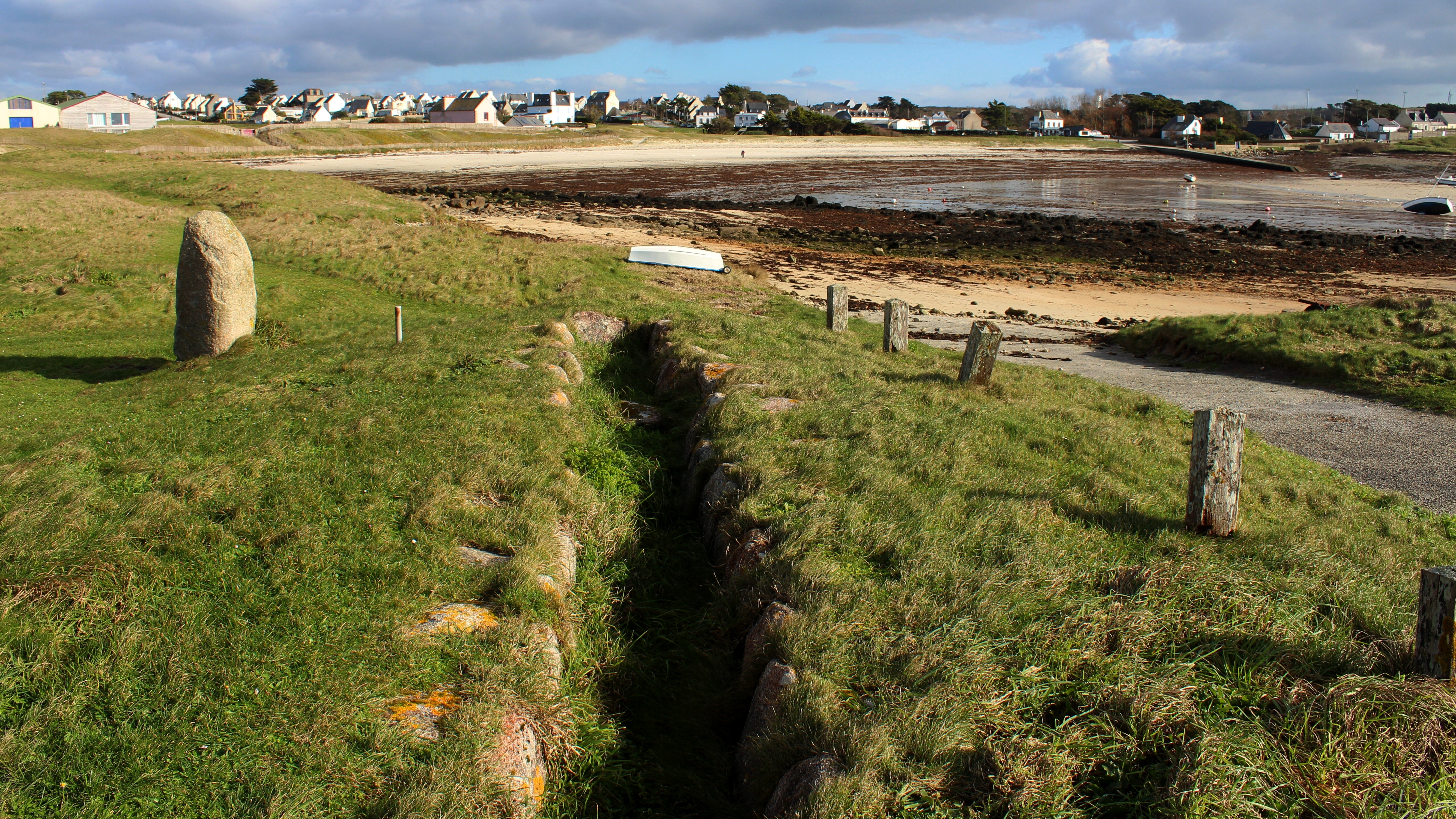 Four utilisé pour brûler des algues et récolter des pains de soude